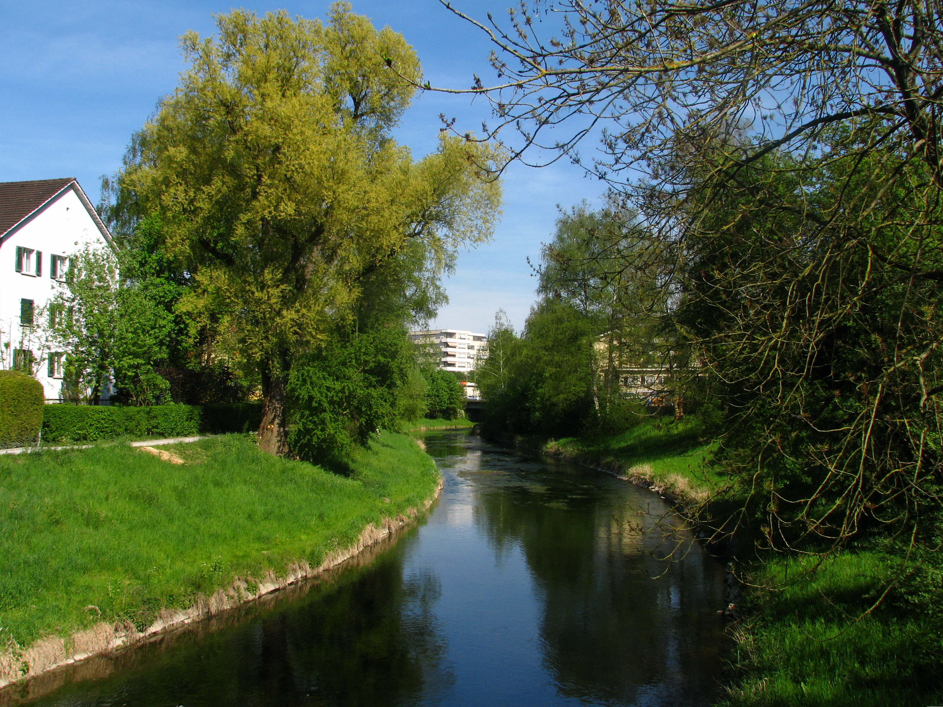 Glatt in Glattbrugg